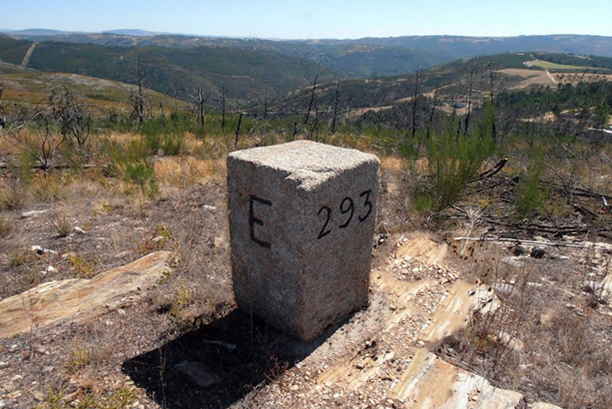 Marco de Valdegalos